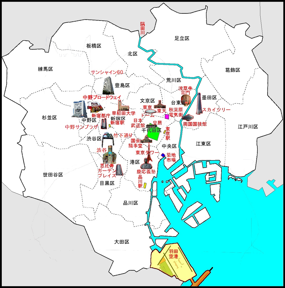 東京都区部の観光地図です。観光マップ。